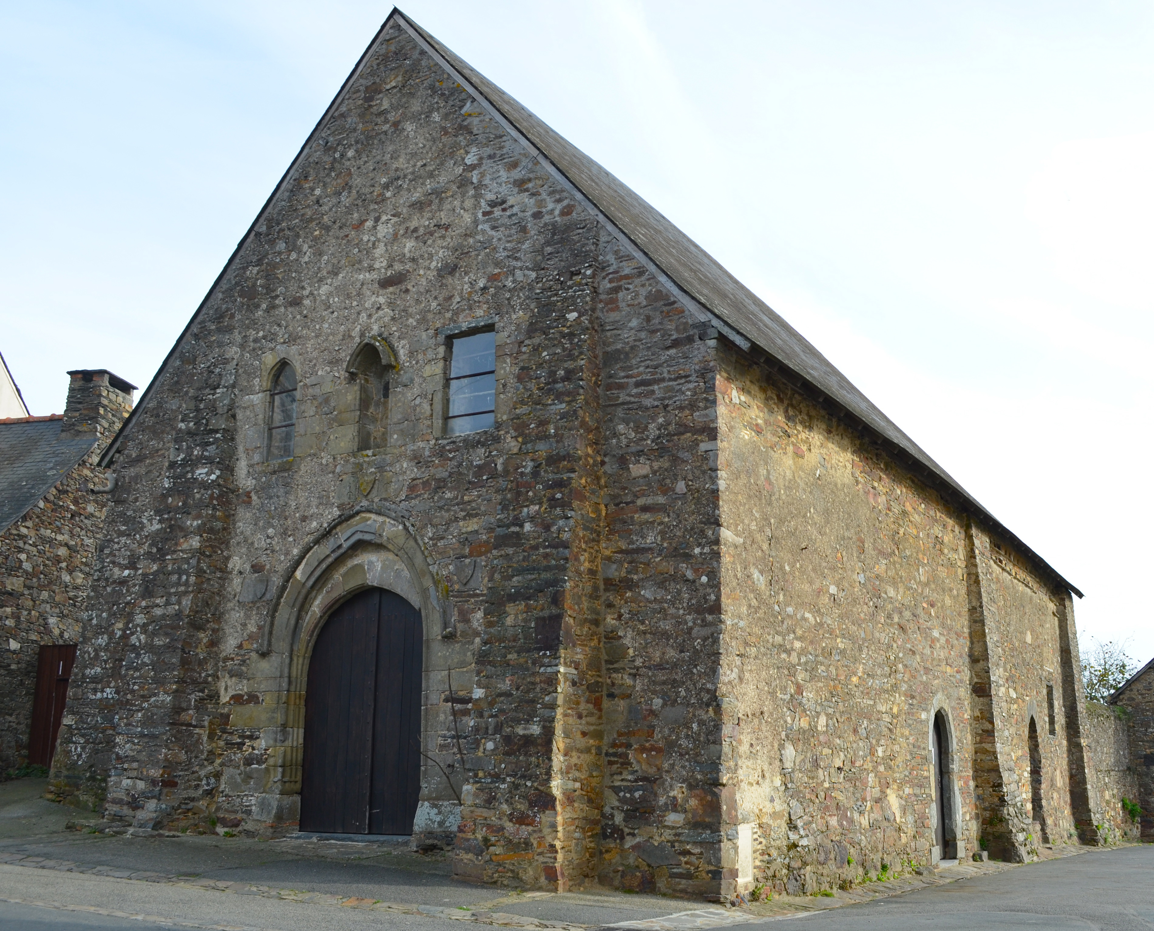 Chapelle des Templiers - Saint-Aubin-des-Châteaux (Loire-Atlantique)